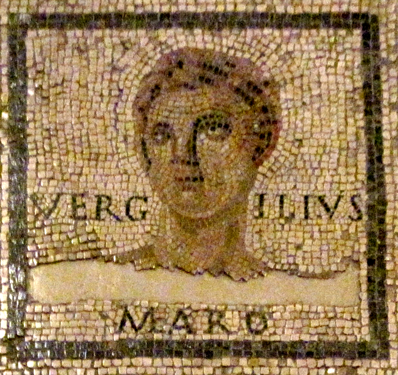 Vergil, Detail aus dem Monnus-Mosaik, einem Mosaik aus dem 3. Jahrhundert nach Christus. Aufgefunden unter dem heutigen Landesmuseum Trier und dort ausgestellt. Interlingua: Depiction de Vergilio in le mosaico de Monno (Trier).